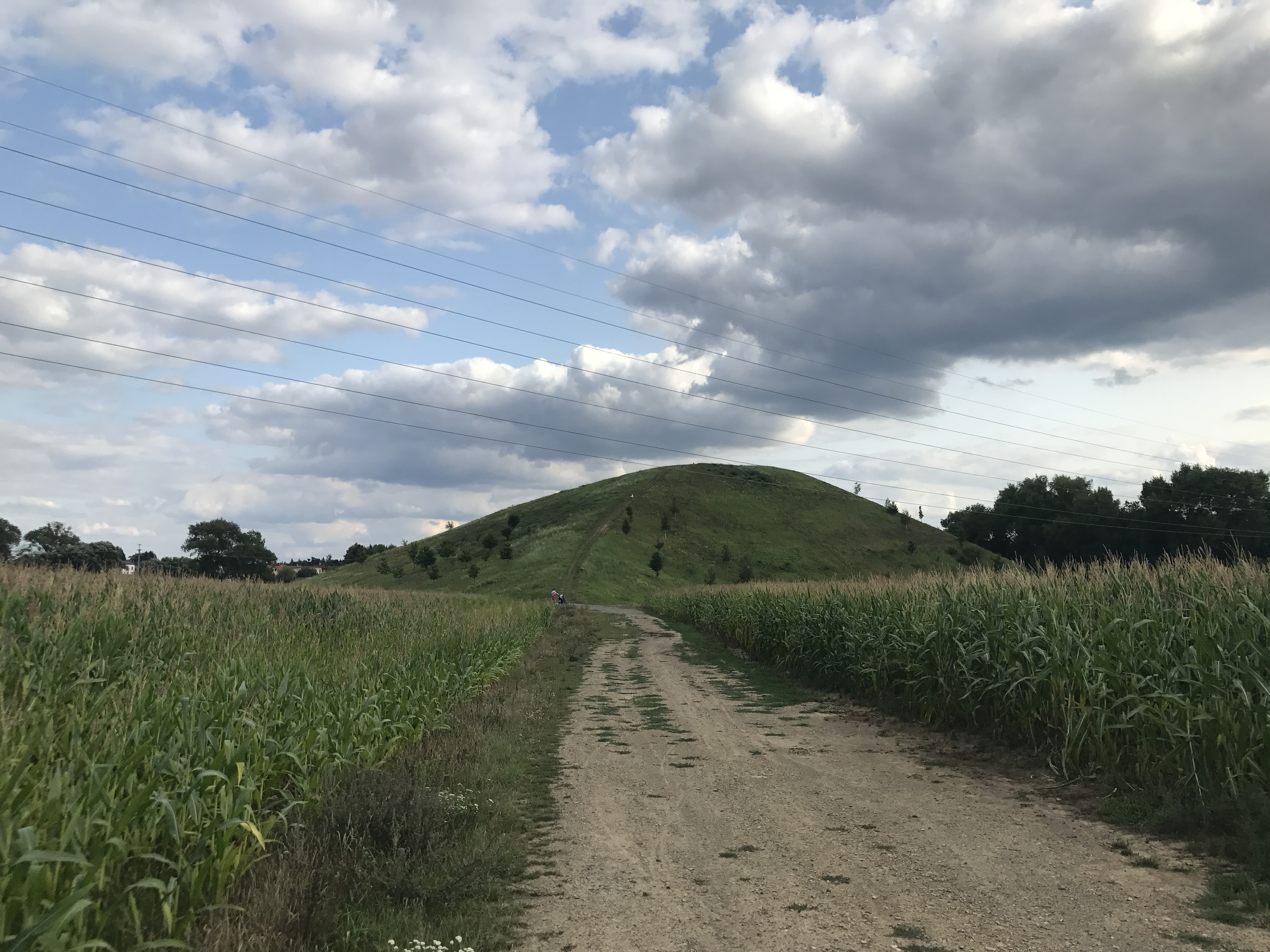 Kopec Kamínek u obce Zlatníky-Hodkovice